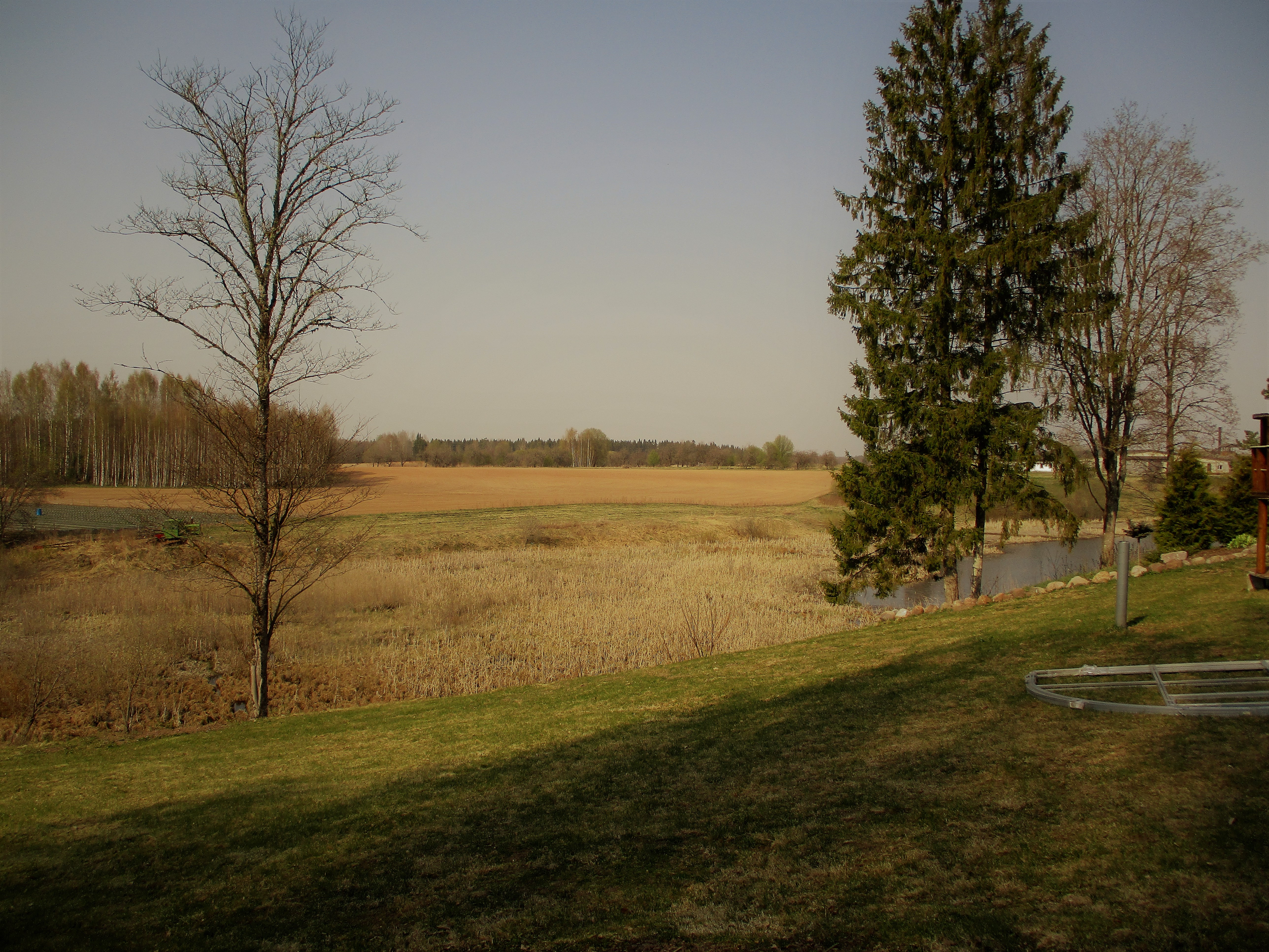 Vaade linnuseala künkalaelt põhja suunas Tsooru paisjärve poole.